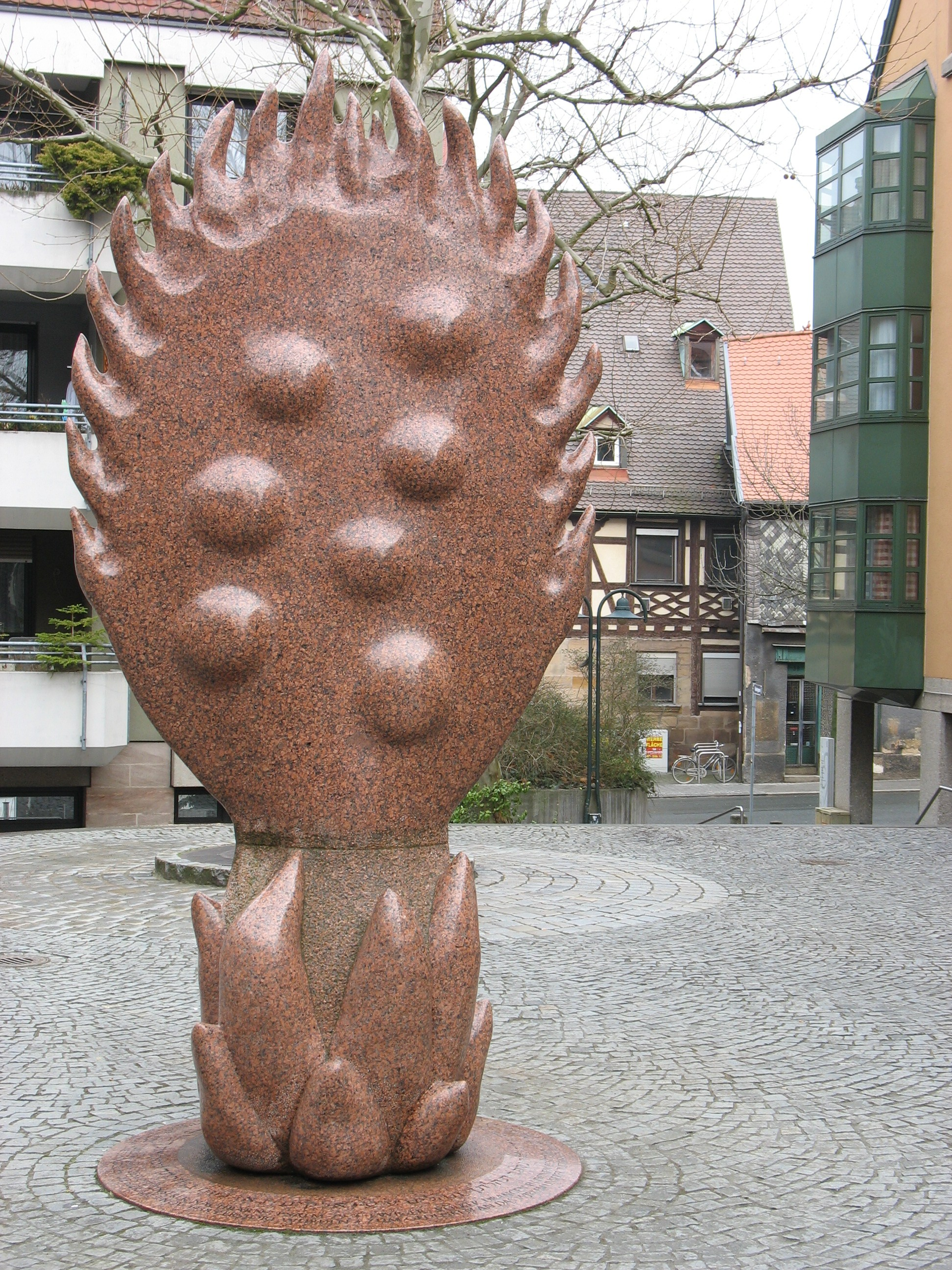 Geleitsgasse in Fürth mit Denkmal für die während des Novemberpogroms 1938 zerstörte Synagoge.